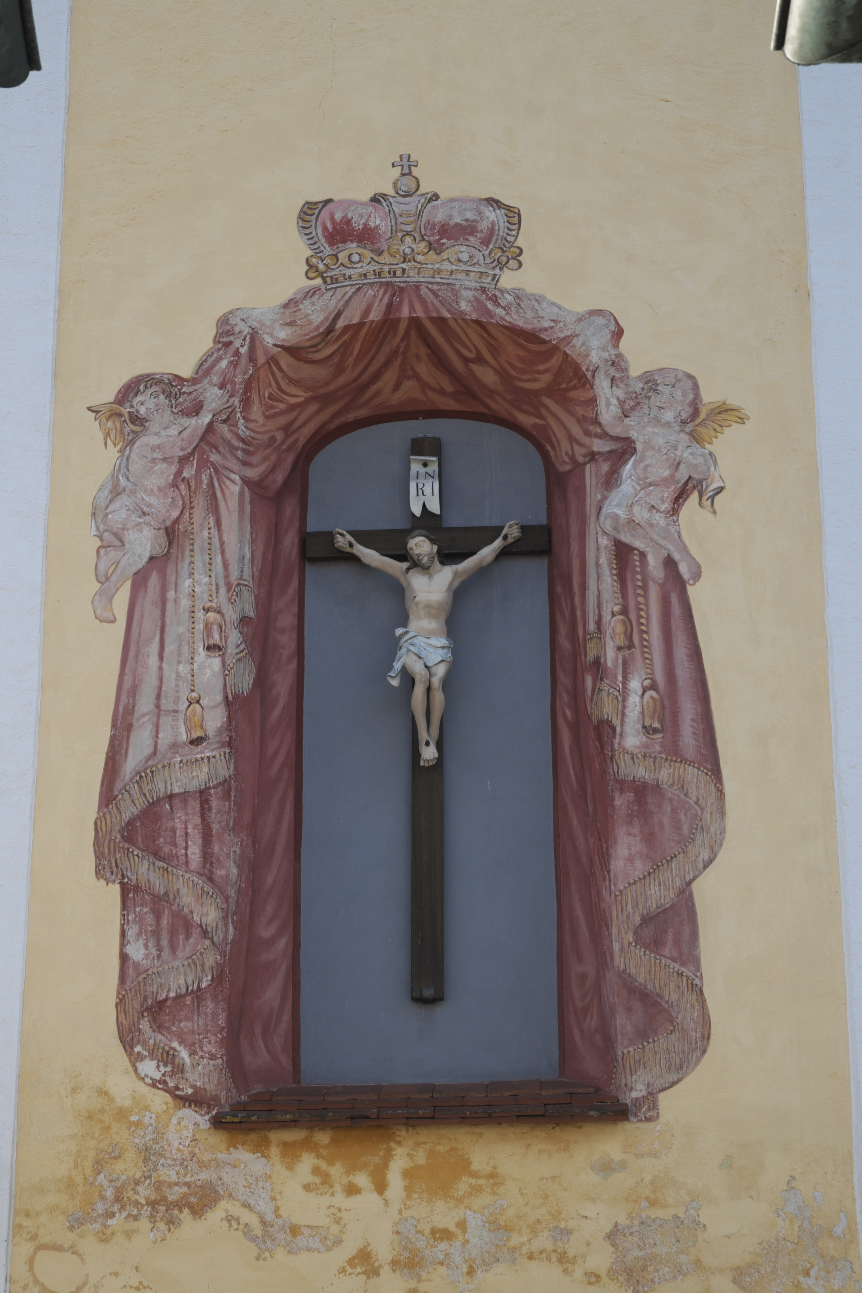 Katholische Pfarrkirche St. Laurentius in Haag an der Amper im Landkreis Freising (Bayern/Deutschland)